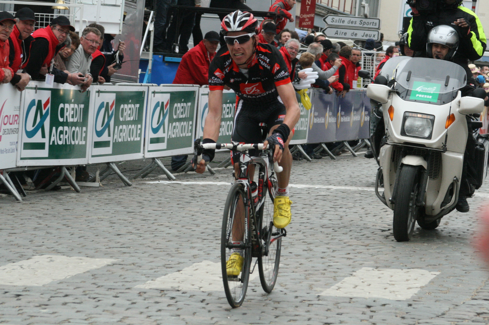 Rui Costa à l'arrivée de la 4e étape des Quatre jours de Dunkerque 2010 à Cassel